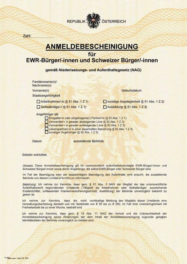 Niederlassung- und Aufenthaltsgesetz